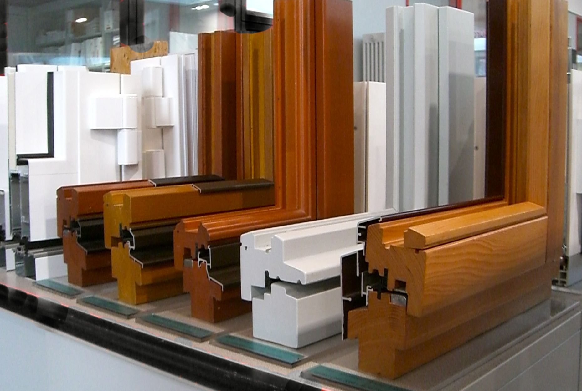 Muster für die Fenstersanierung nach industriellem Maßstab.